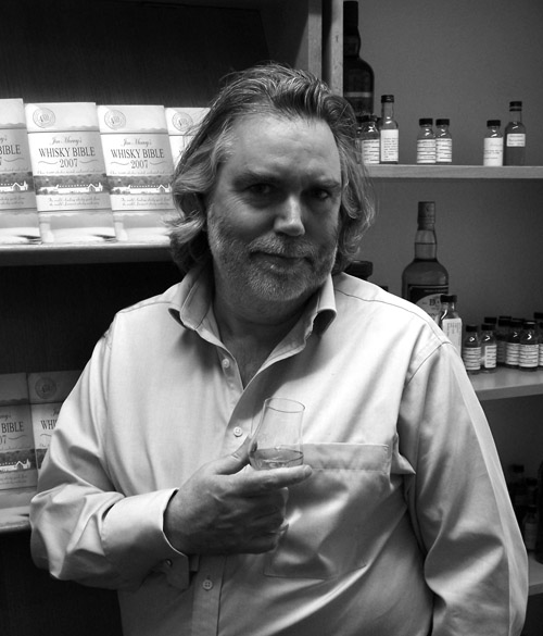 Jim Murray at his tasting lab in 2007